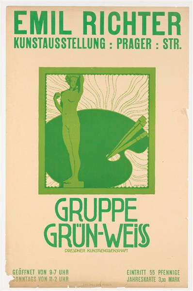 Max Frey. Plakat: Emil Richter Kunstausstellung - Gruppe Grün-Weiss, Dresdner Kunstgenossenschaft, 1910.